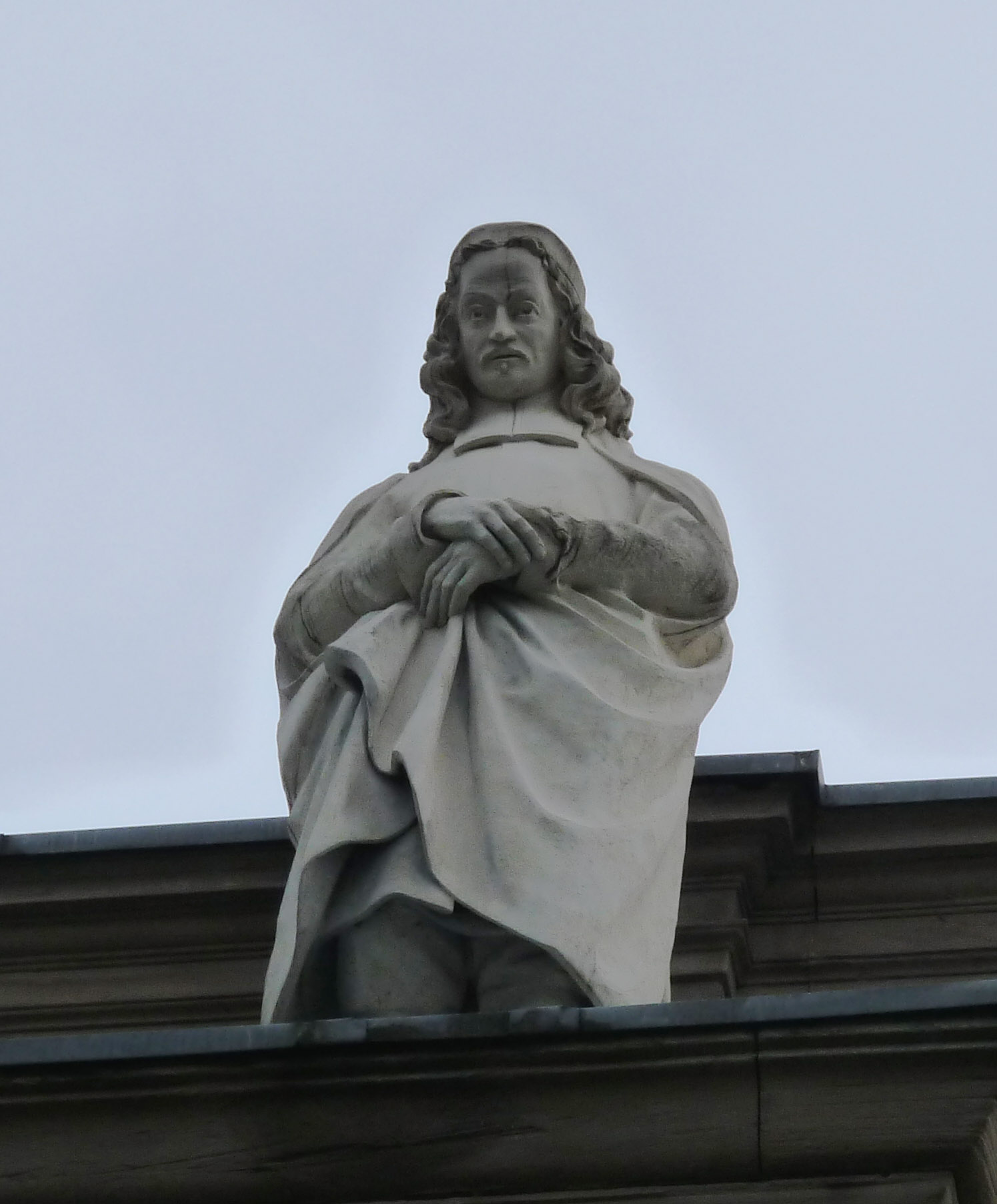 Philipp Jacob Spener, statue sur la corniche du Palais universitaire de Strasbourg